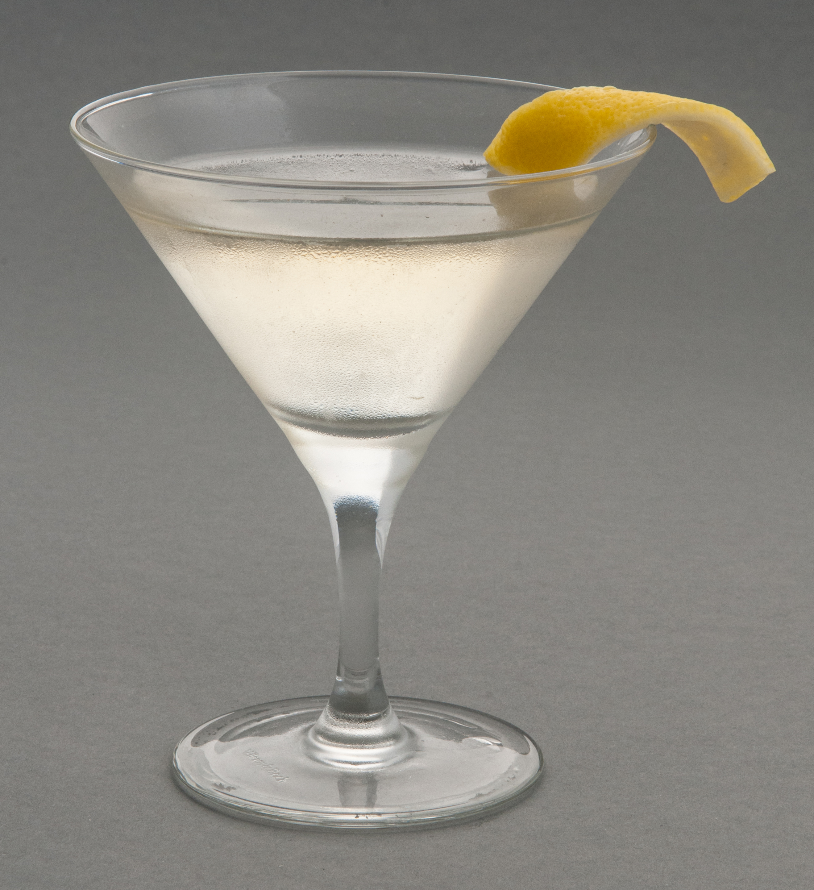 Martini